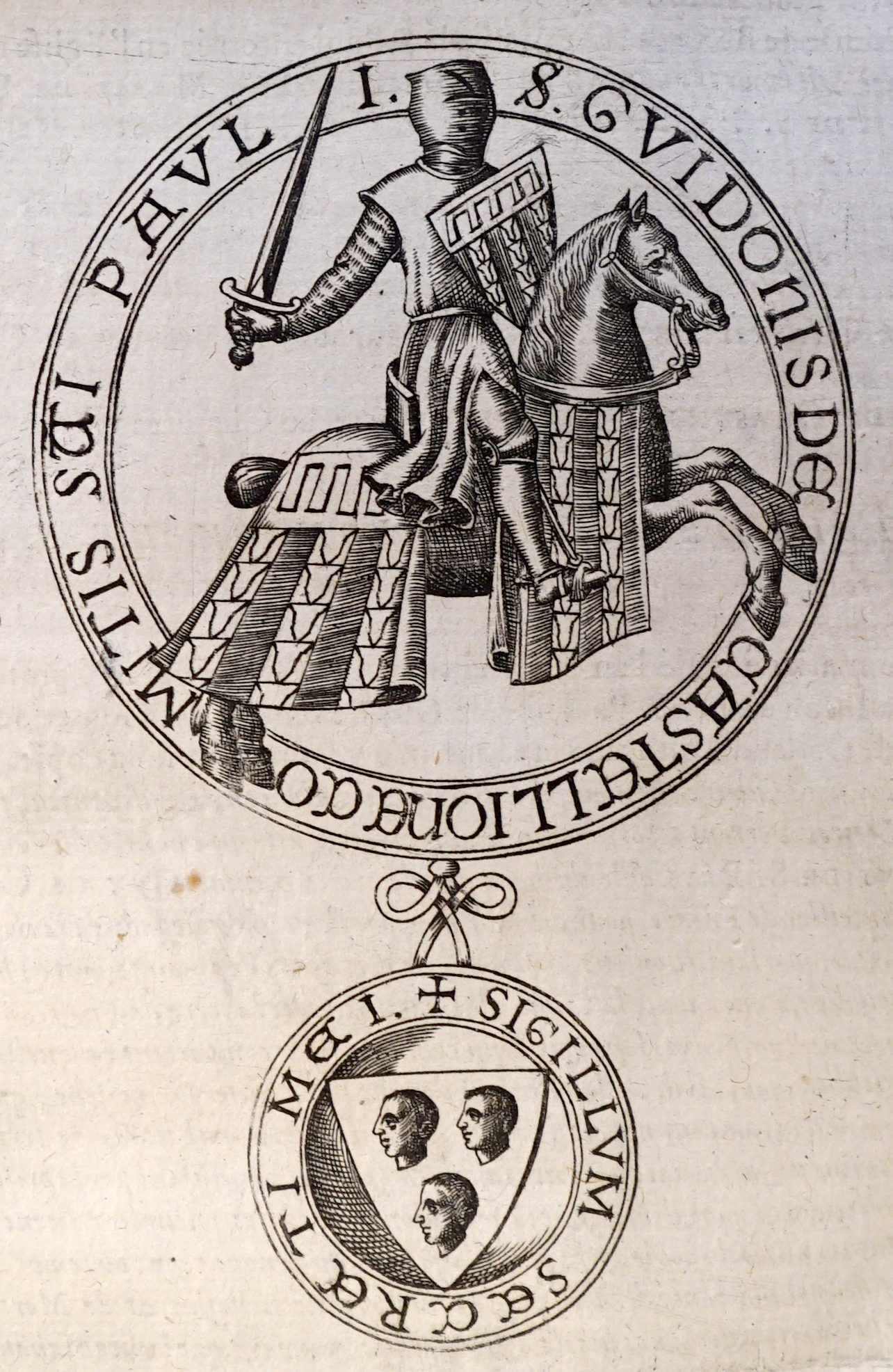 reproduction du sceau de guy de chatillon.